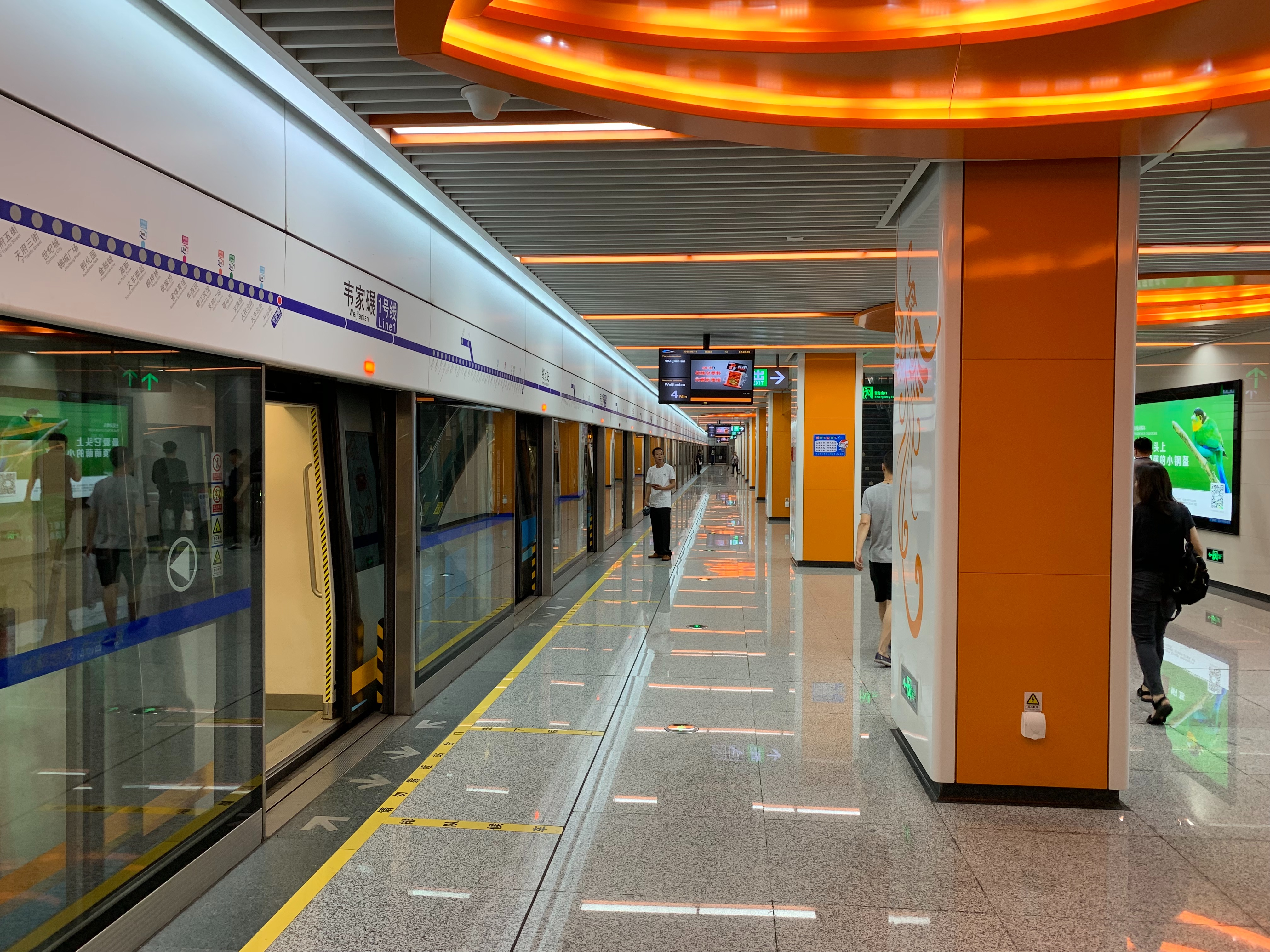 成都地铁韦家碾站